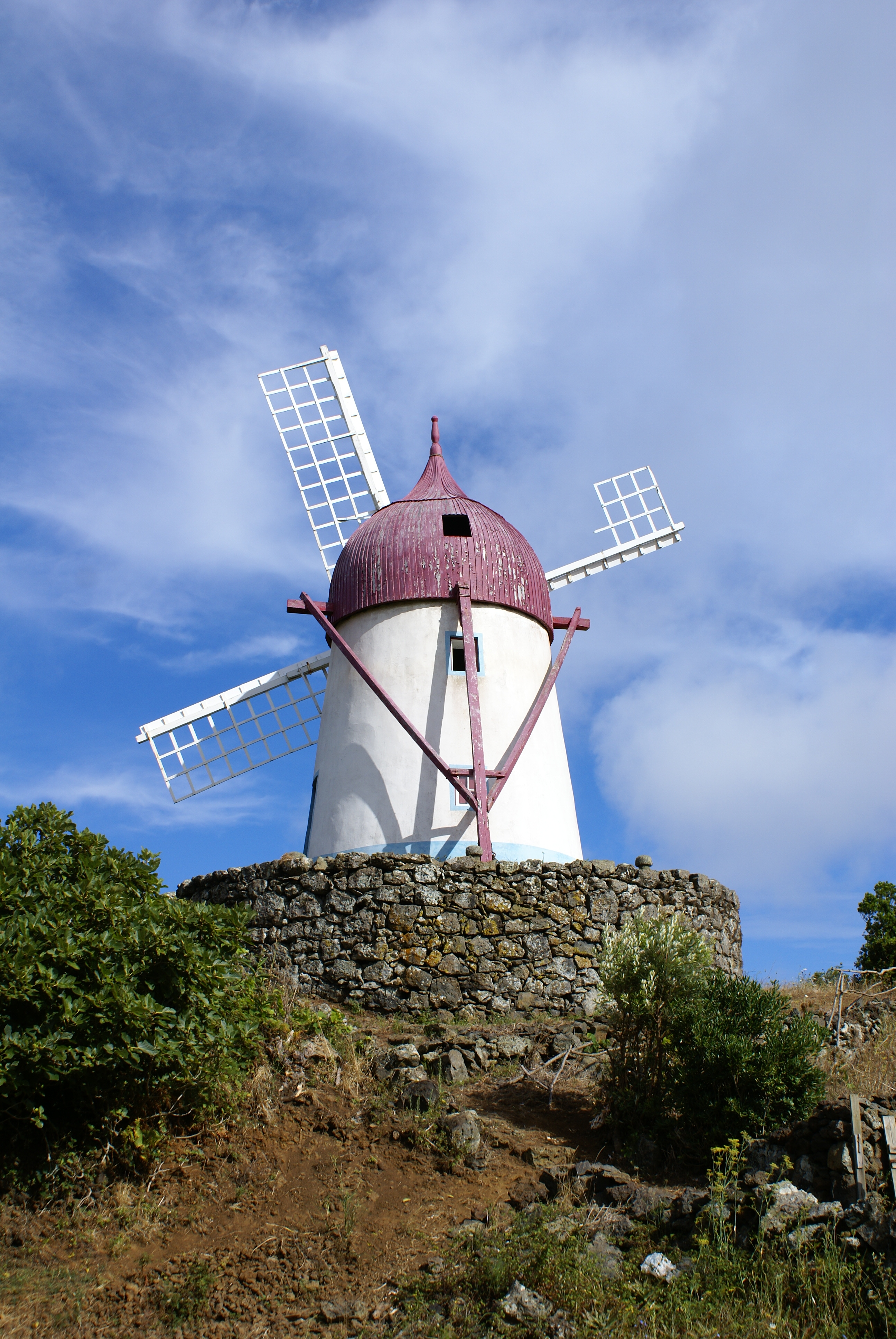 Manuel Gaspar, moinho típico, Santa Cruz da Graciosa, ilha Graciosa, Açores, Portugal